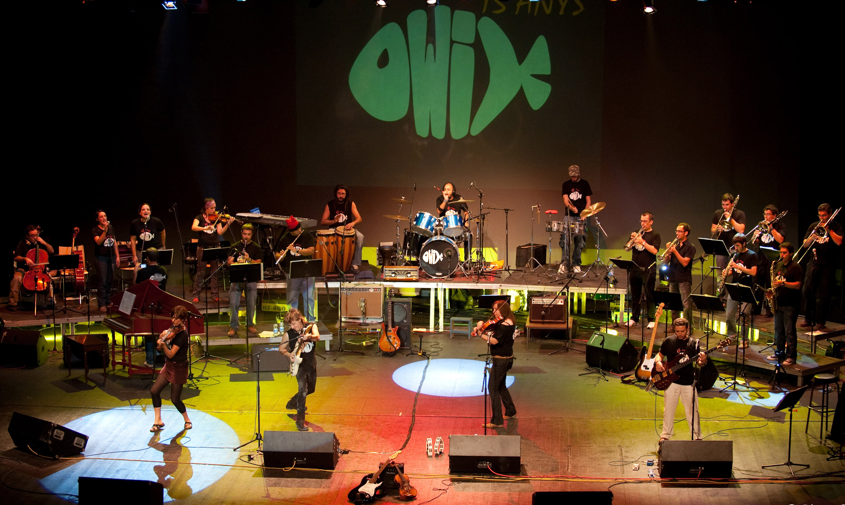 Owix al Palau